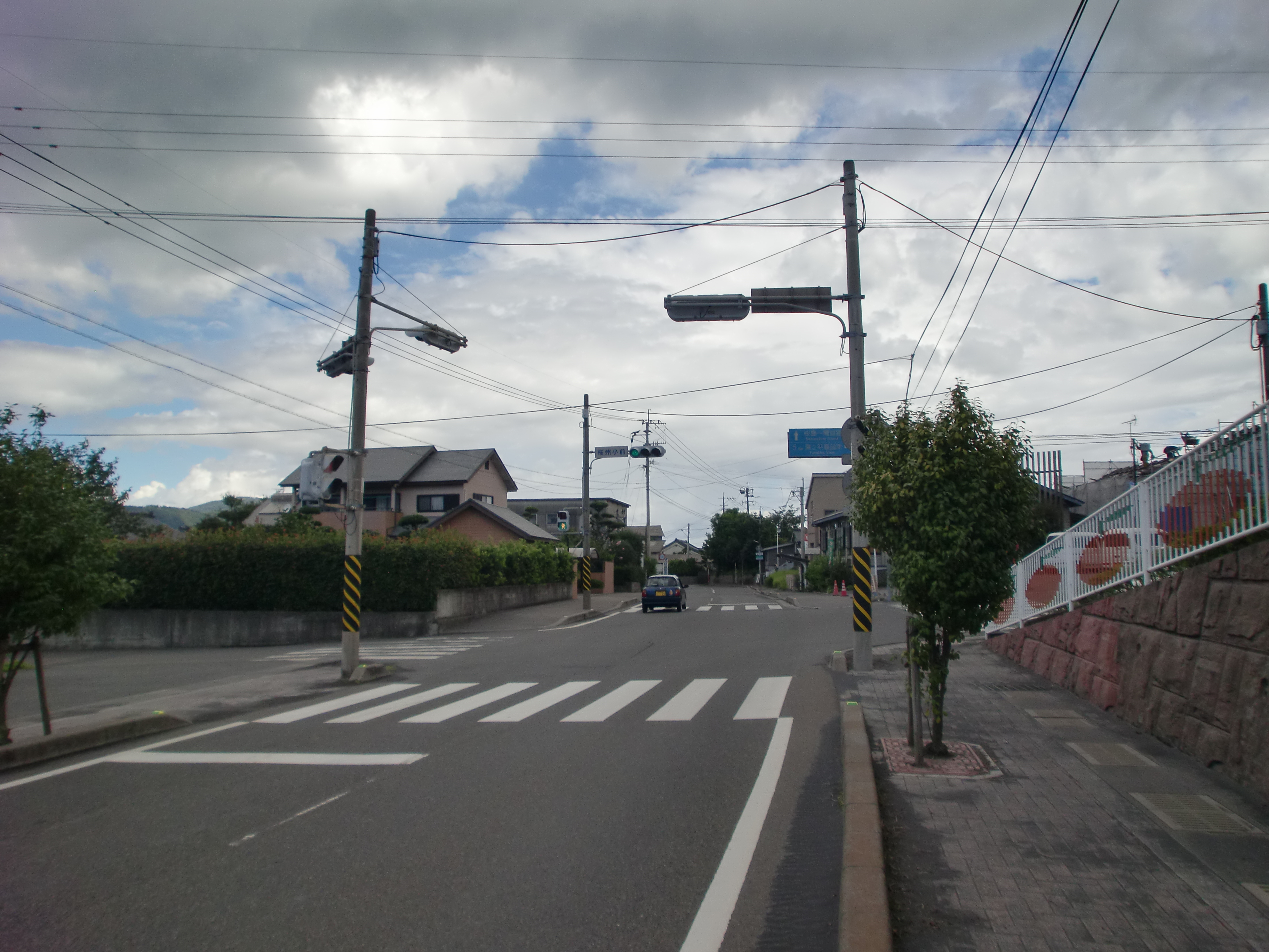 鹿児島県道26号桜島黒神線を桜島小池町から黒神町方面に望む。